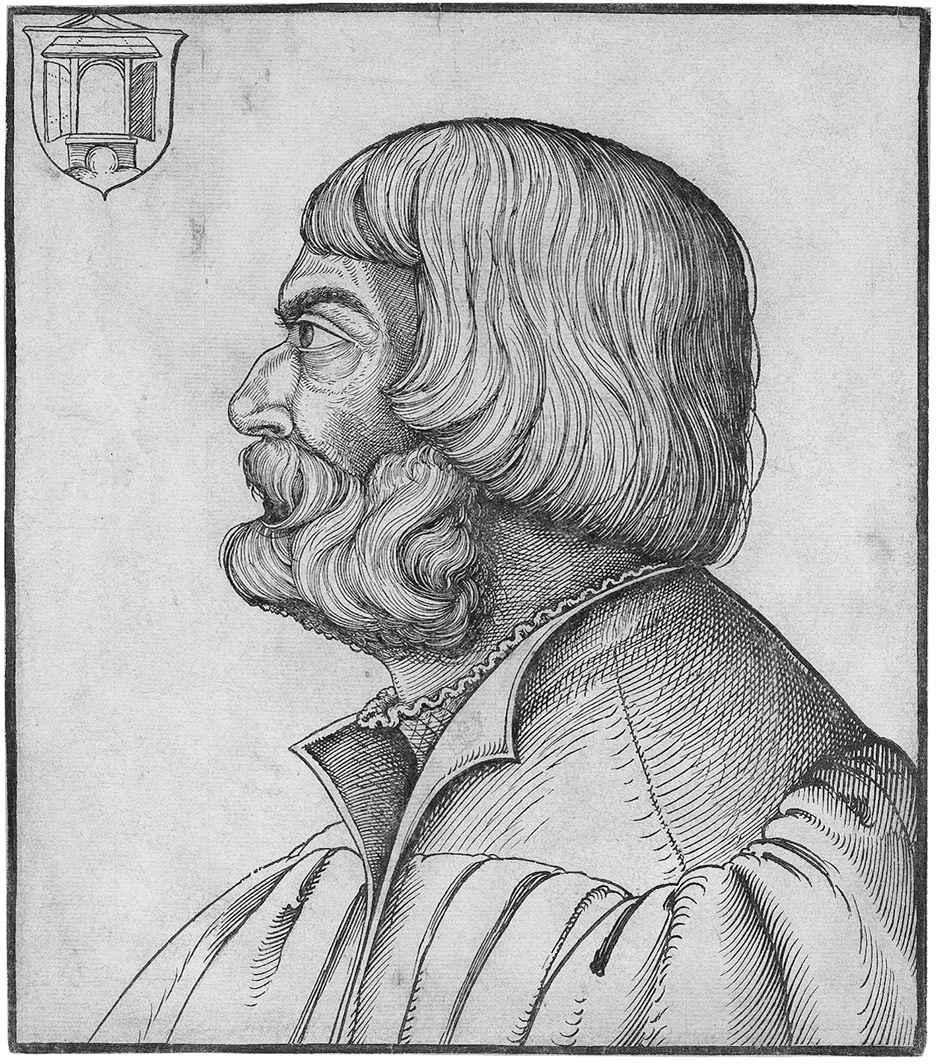 Erhard Schön: Bildnis Albrecht Dürer im Profil. Holzschnitt. 29,6 x 26,1 cm. Nach 1528